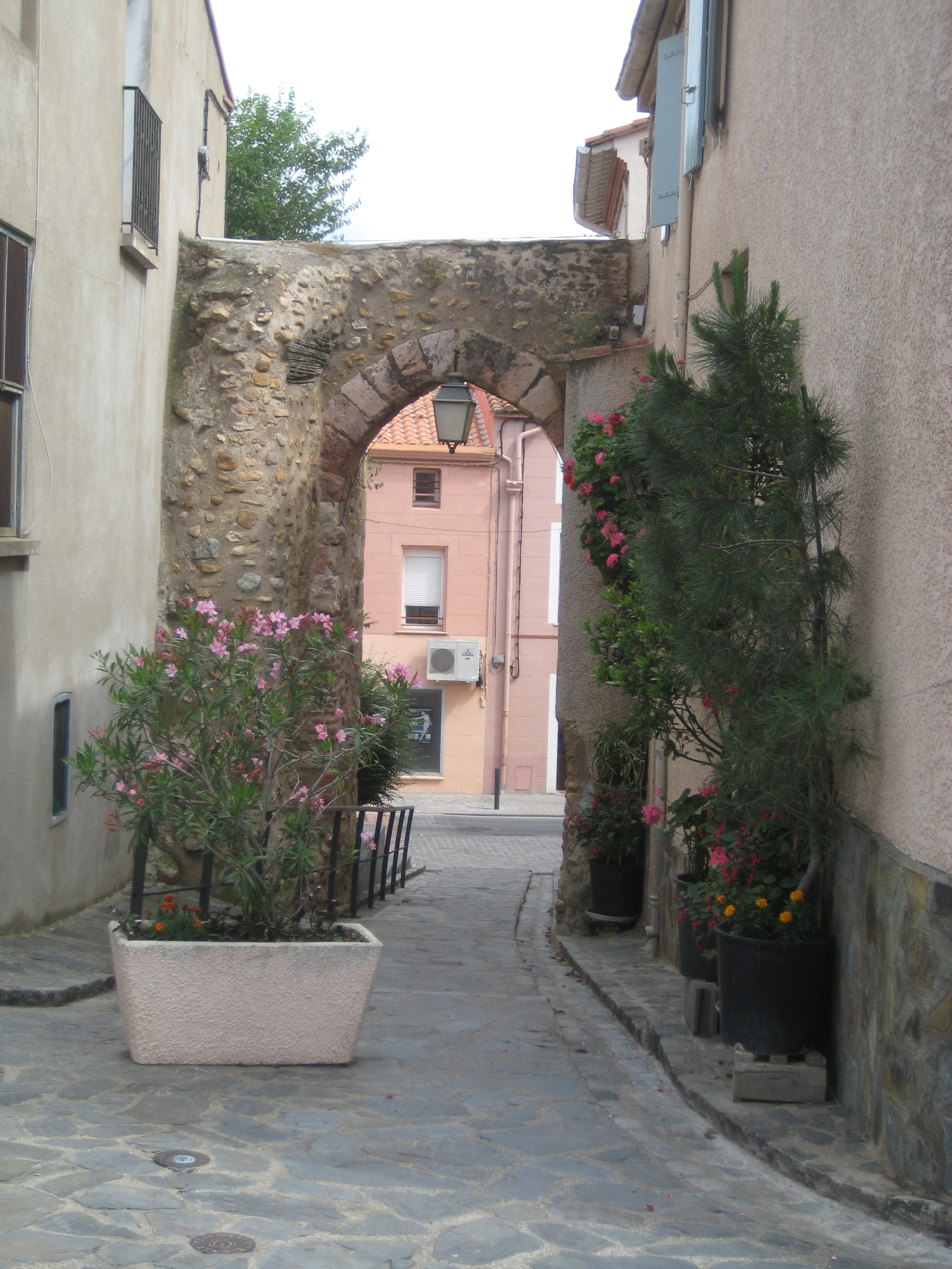 Ruelle au centre de Pollestres